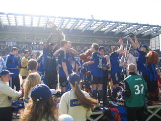 Picture FC Bruges